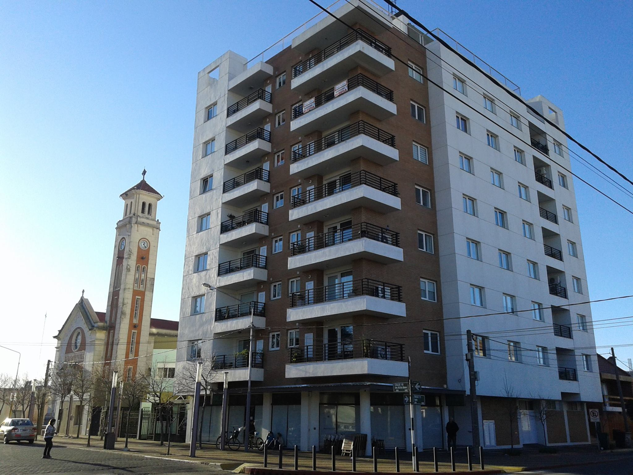 Edifcio Plaza, cuenta con cafetería en planta baja, Calle 11 esquina 18.